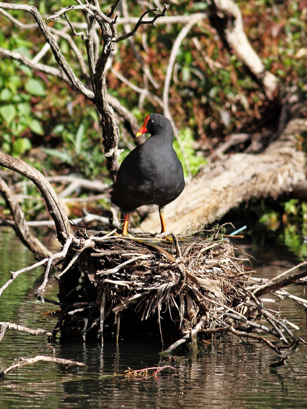 A Dusky Moorhen (Gallinula tenebrosa)